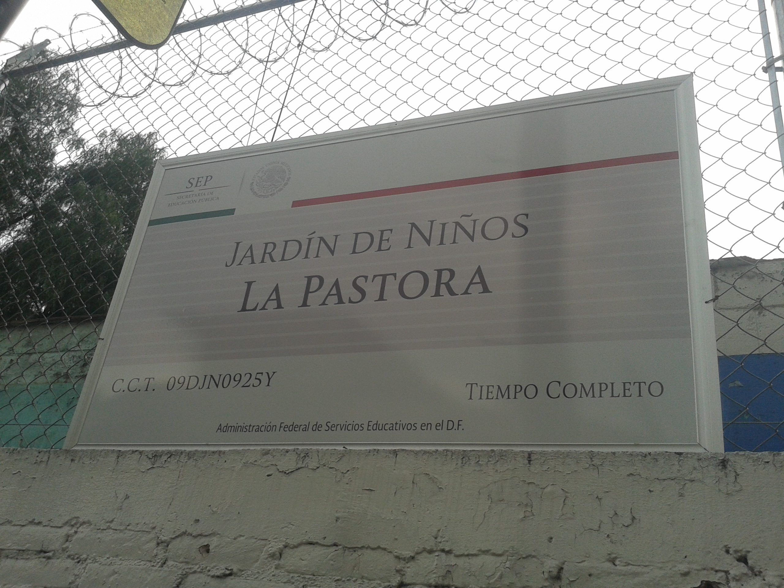 Jardin de Niños La Pastora.